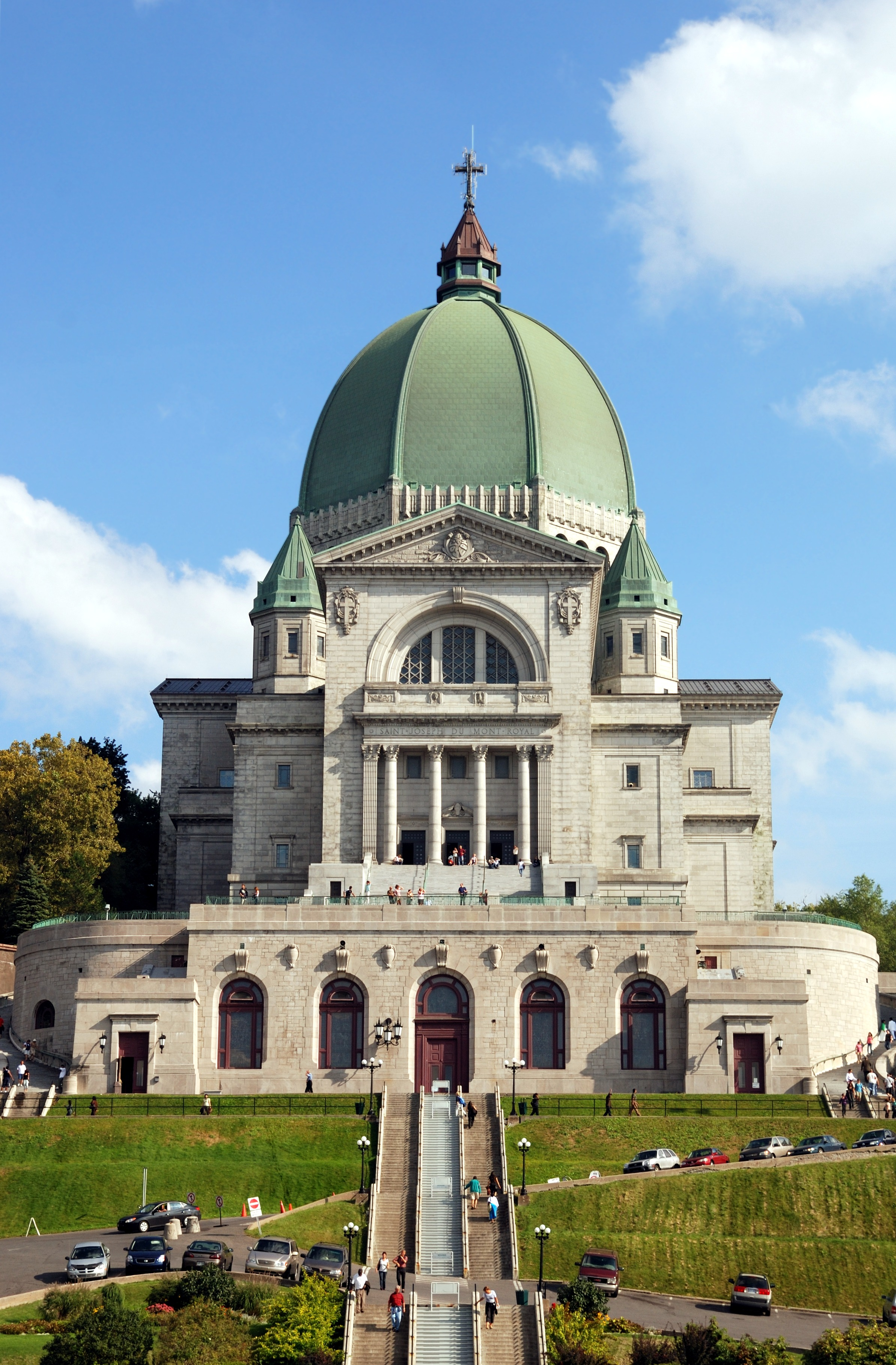 Montréal: St.-Josephs-Oratorium